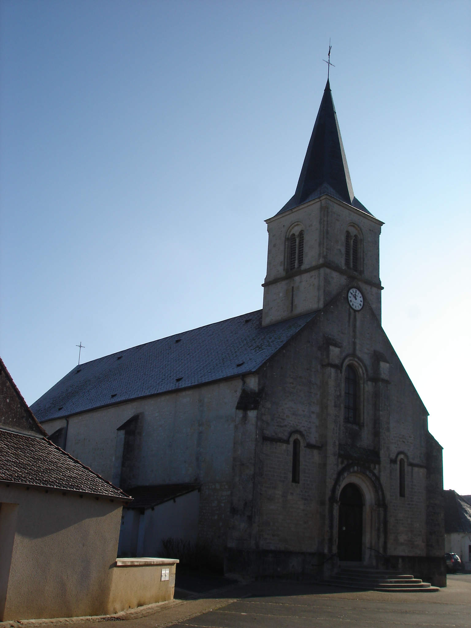 Saint-Août (36) : L'église.